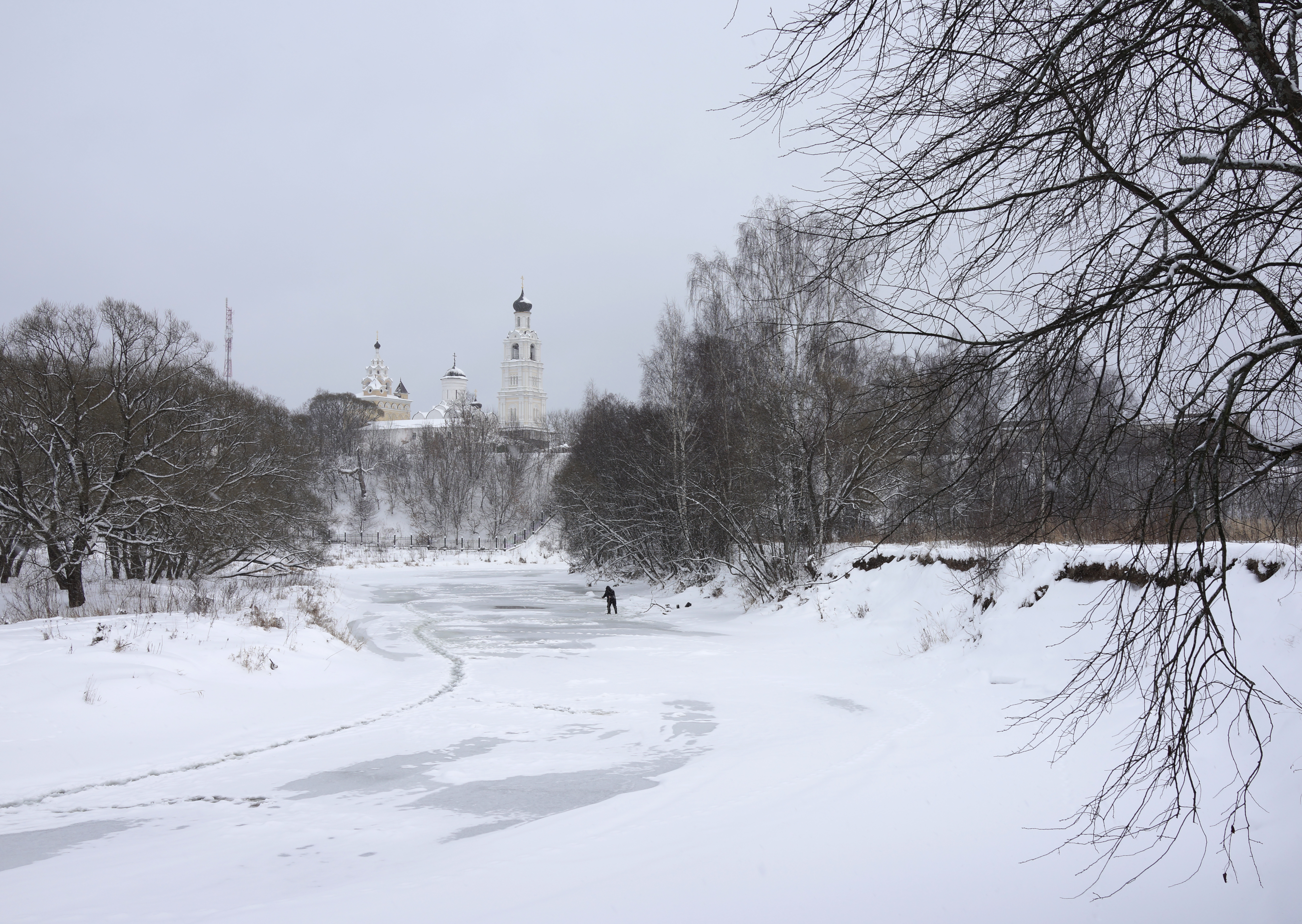 Благовещенский монастырь. Город Киржач. Река Киржач. Россия. Владимирская область.